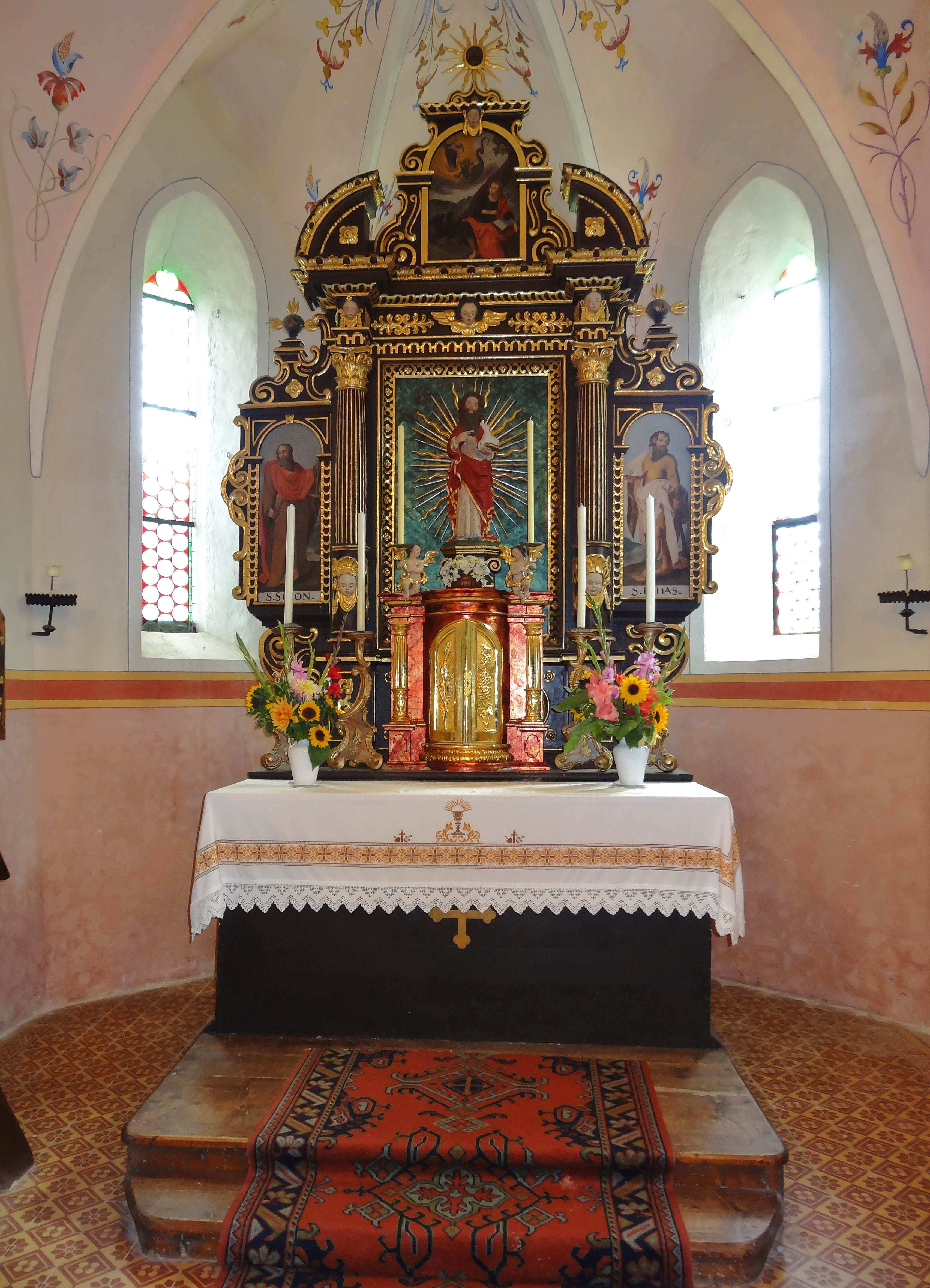 Kath. Filialkirche hl. Johannes der Täufer, der Hochaltar mit Statue des hl. Johannes